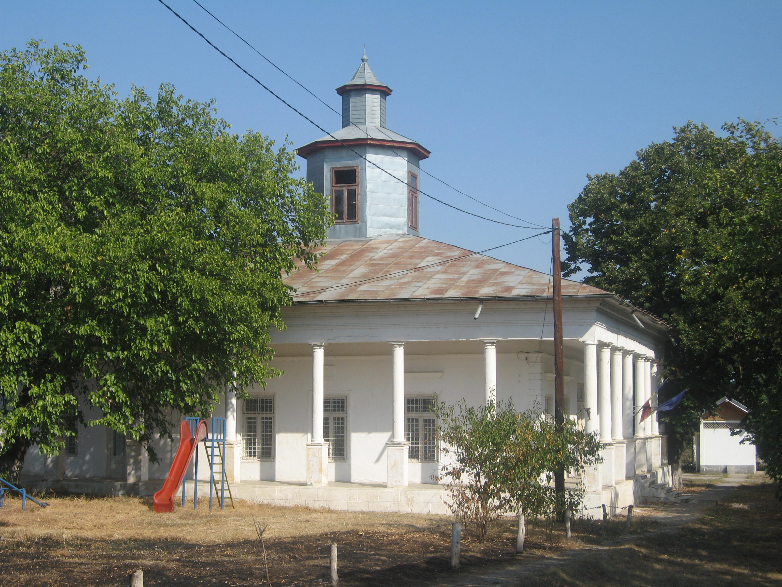 Conacul Tache Anastasiu din Călmăţui, jud. Galaţi, România